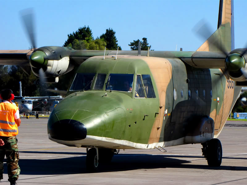 CASA 212-300 966 de la Fuerza Aérea de Chile, que sufrió el accidente del 2 de septiembre en Juan Fernández.